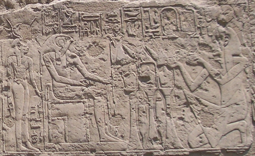 Relief représentant Osorkon II devant le dieu Sokaris et la déesse Hathor - Chapelle du grand prêtre de Ptah Sheshonq, fils d'Osorkon II - XXIIe dynastie égyptienne - Jardin du Musée du Caire